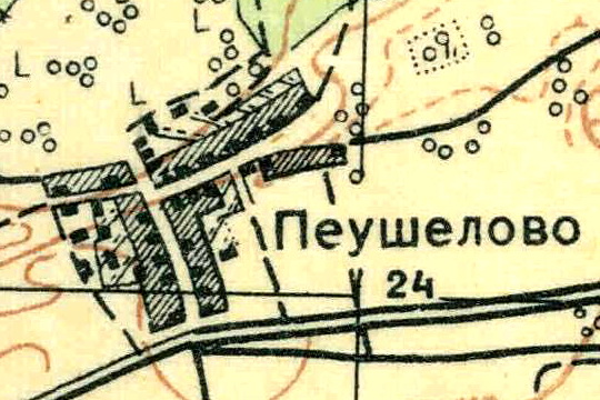 Топографическая карта Ленинградской области, квадрат О-35-24-Б-а (Переярово), деревня Пеушалово